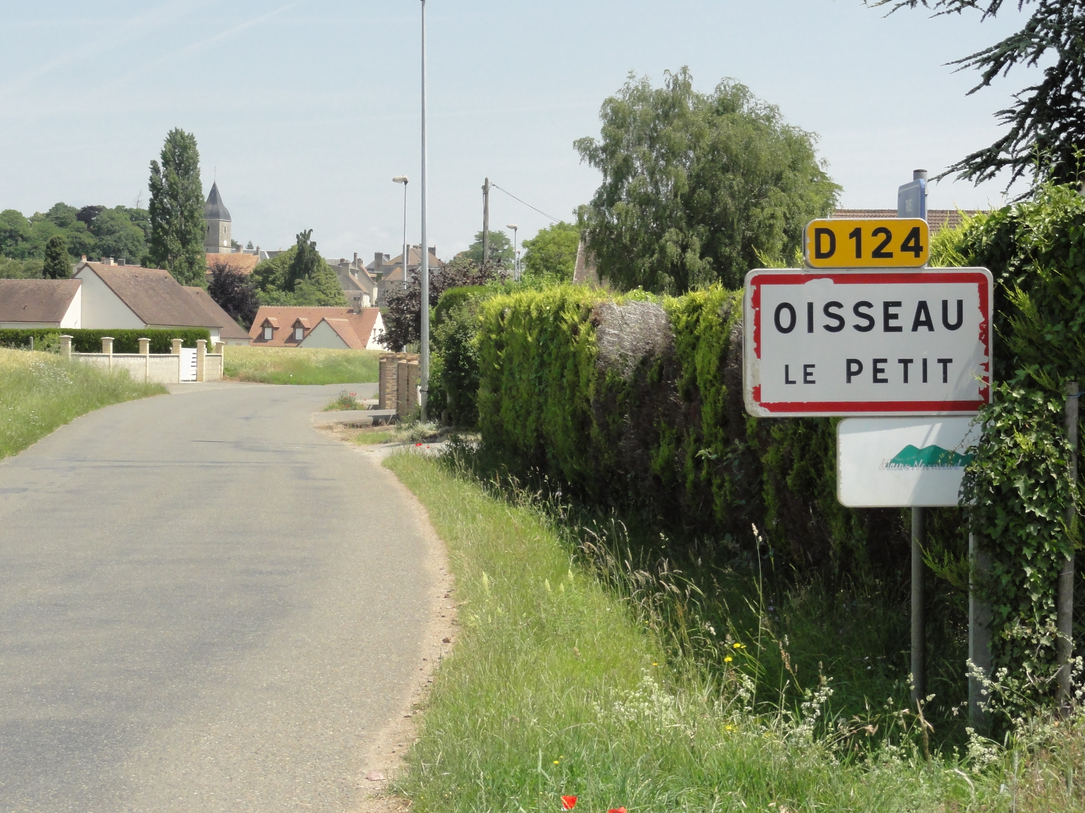 Oisseau-le-Petit (Sarthe) entrée